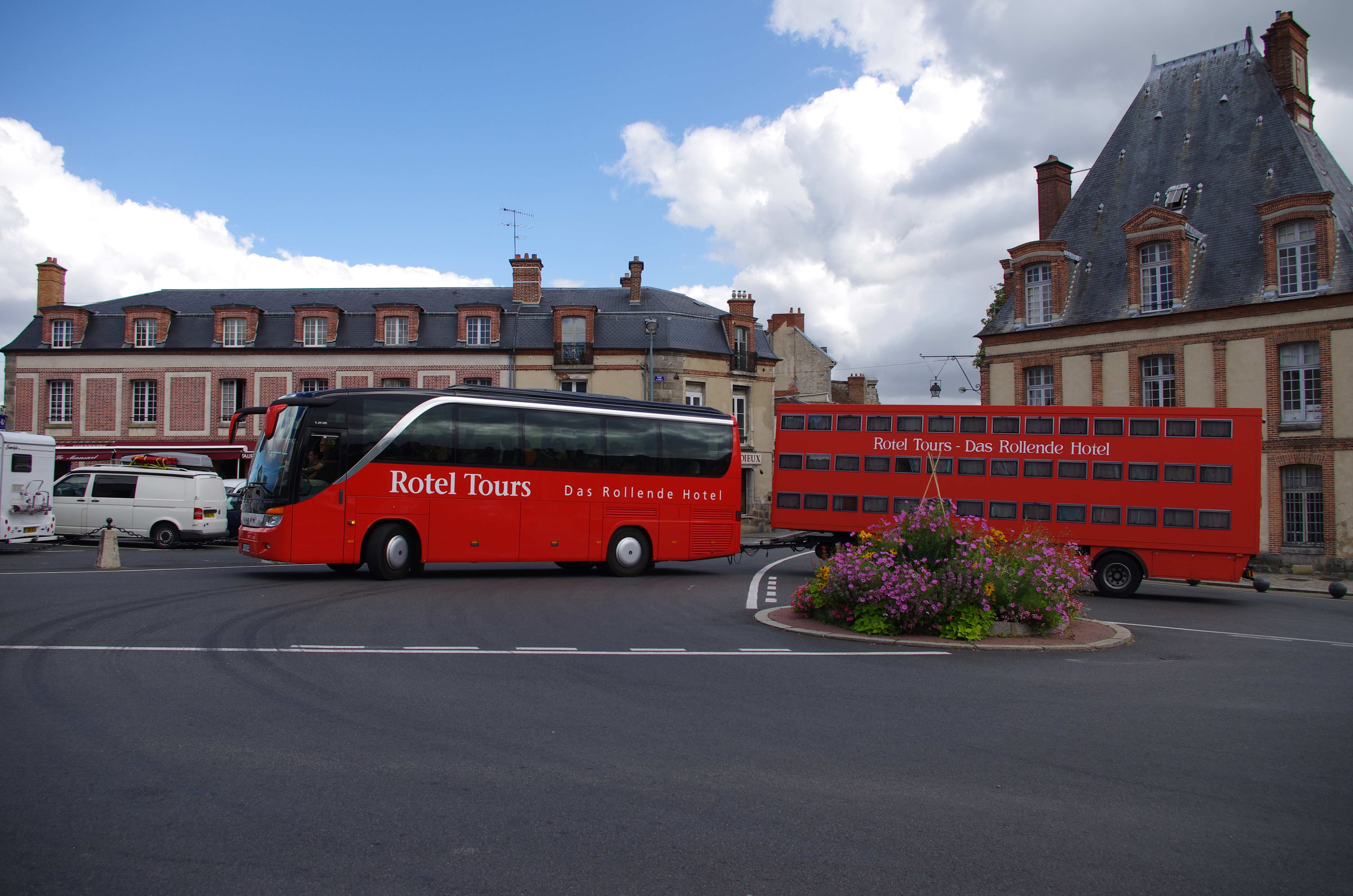 Foutaineblue in Frankreich. ein Bus der Rotel Tours umfährt ein Kreisverkehr direkt am Schloß.